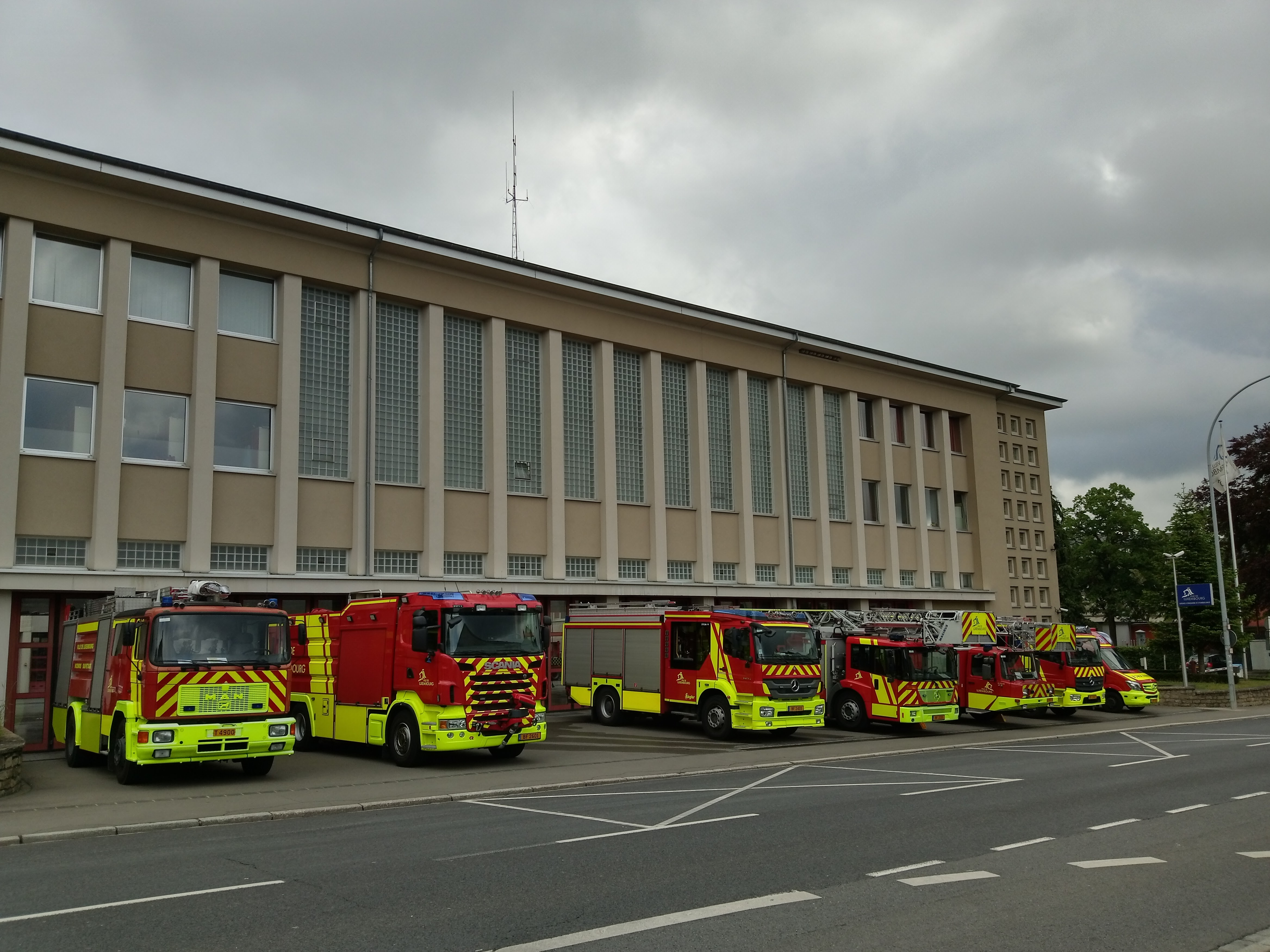 Luxembourg, Caserne du Service d'incendie et d'ambulances de la Ville de Luxembourg à la route d'Arlon.